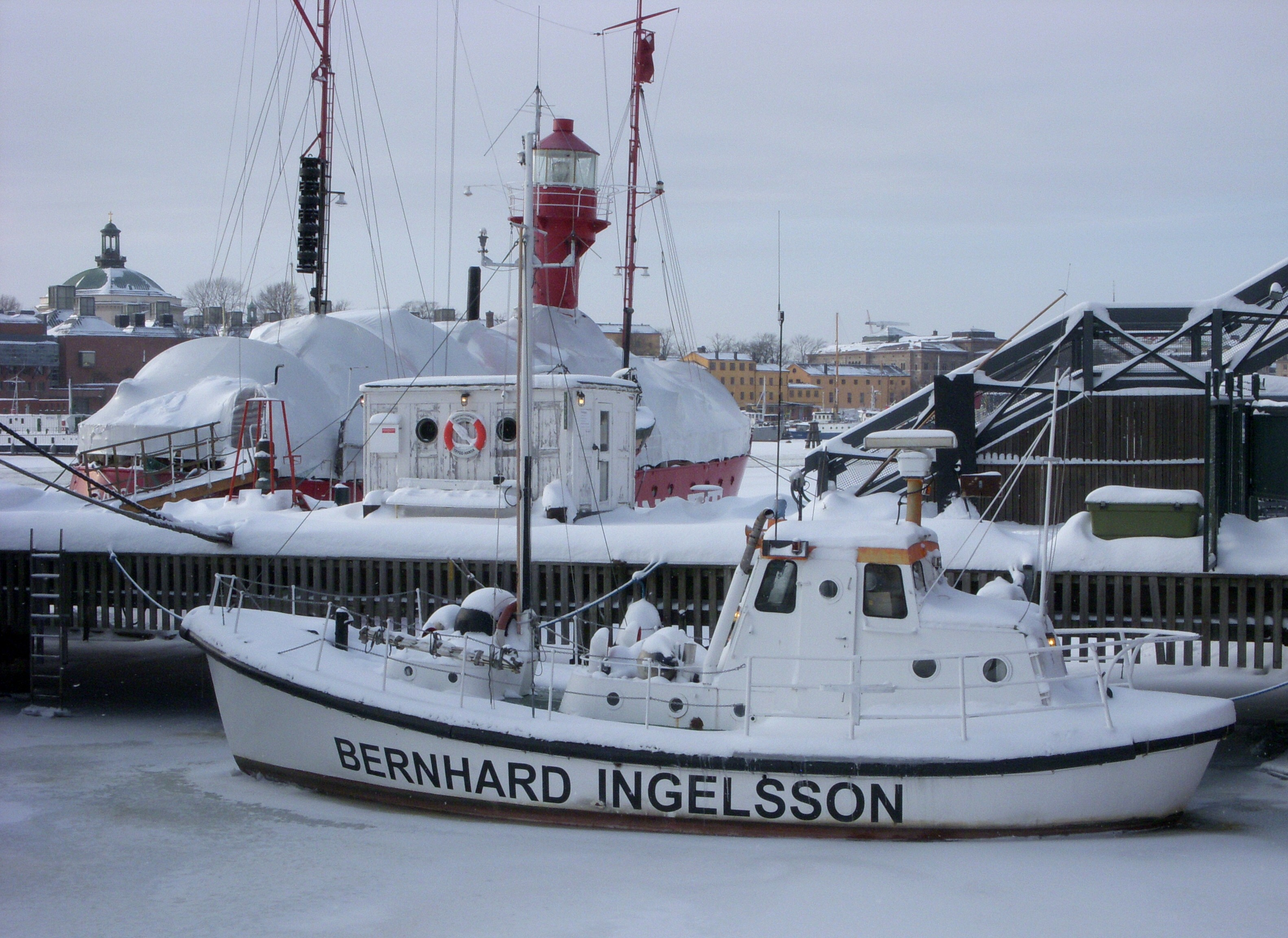 Sjöräddningskryssare "Bernhard Ingelsson" vid museumskajen, Vasavarvet